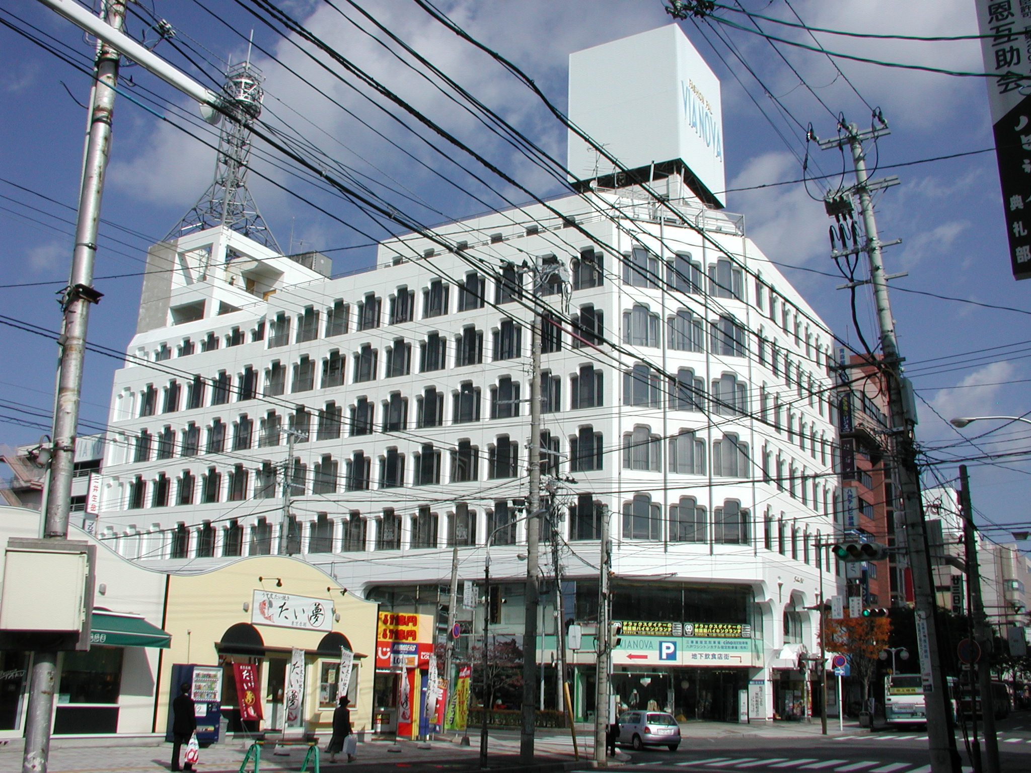 ファッションパル・ヴィアノヴァ（ヴィアノヴァビルディング） オフィスフロアには、八戸テレビ放送・青森朝日放送八戸支社なども入居している。